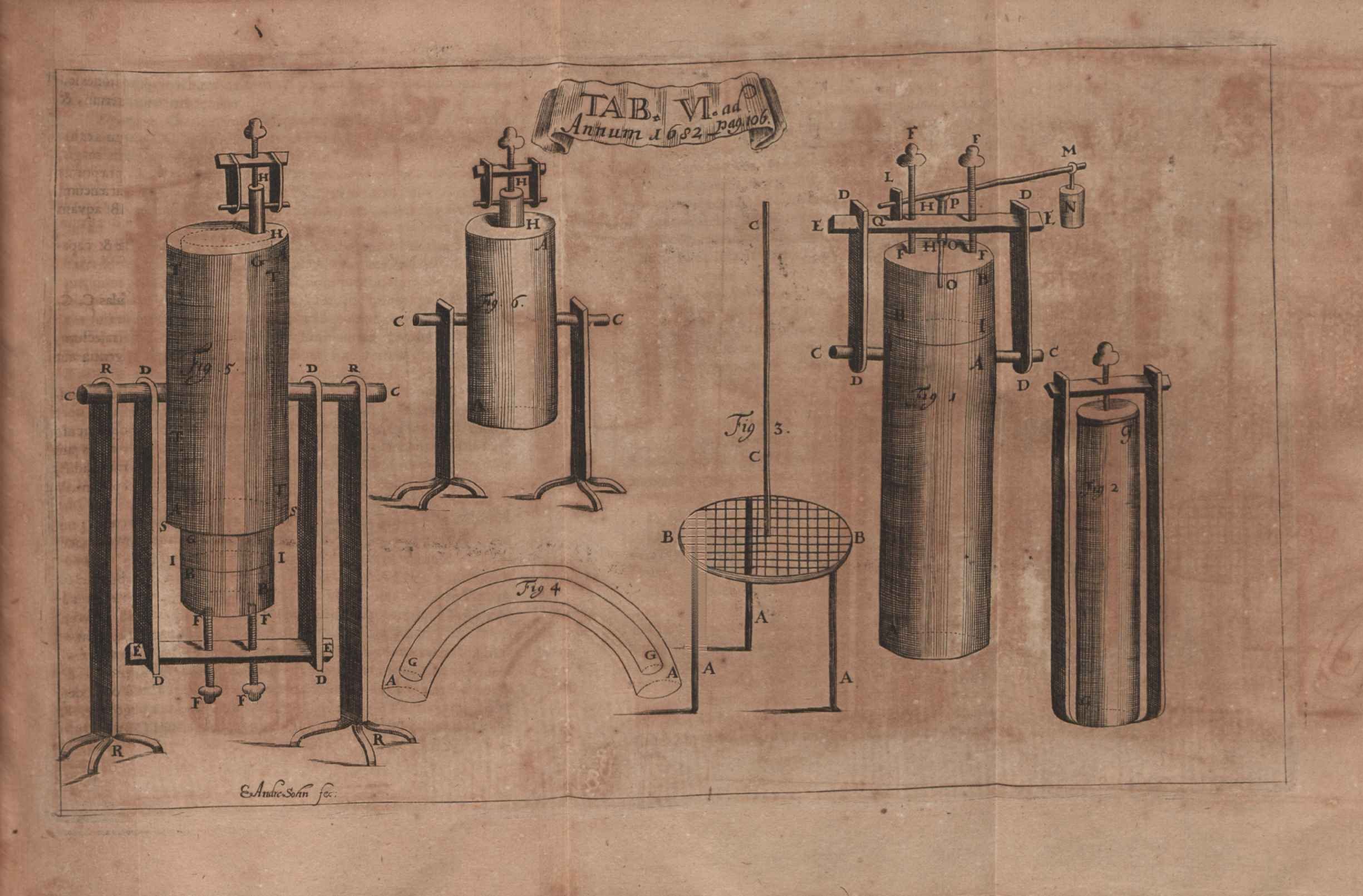 Illustration